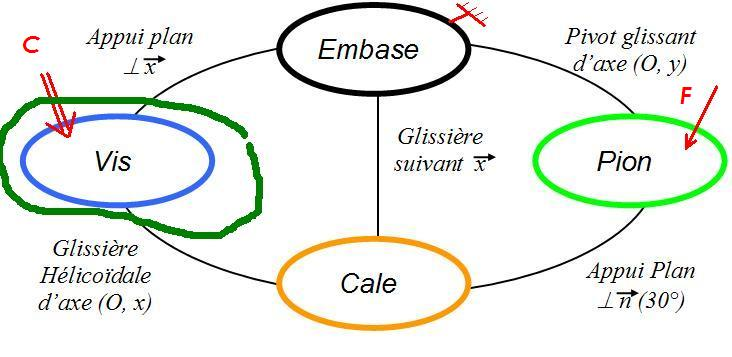 Graphe des actions mécaniques. Réalisé sous Word et MS paint.